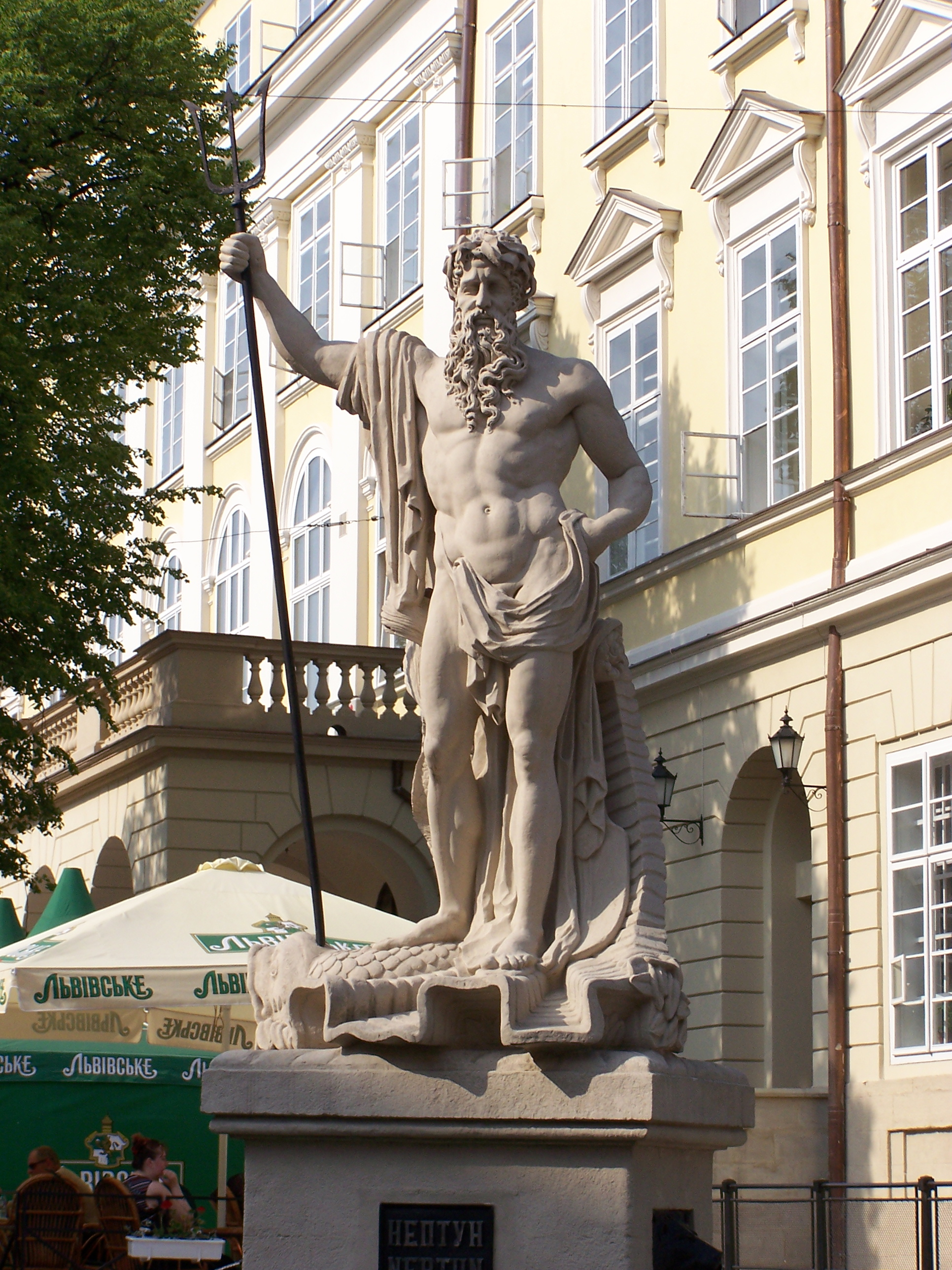 Rzeźba Neptuna na rynku we Lwowie (Ukraina).